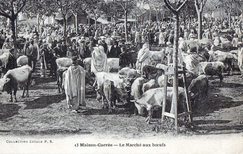 Le marché aux bestiaux de Maison-Carré au début du XXe siècle.